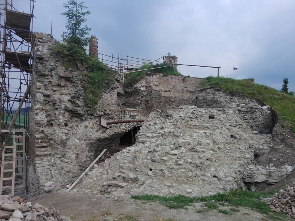 Obnova priľahlej JV bašty.